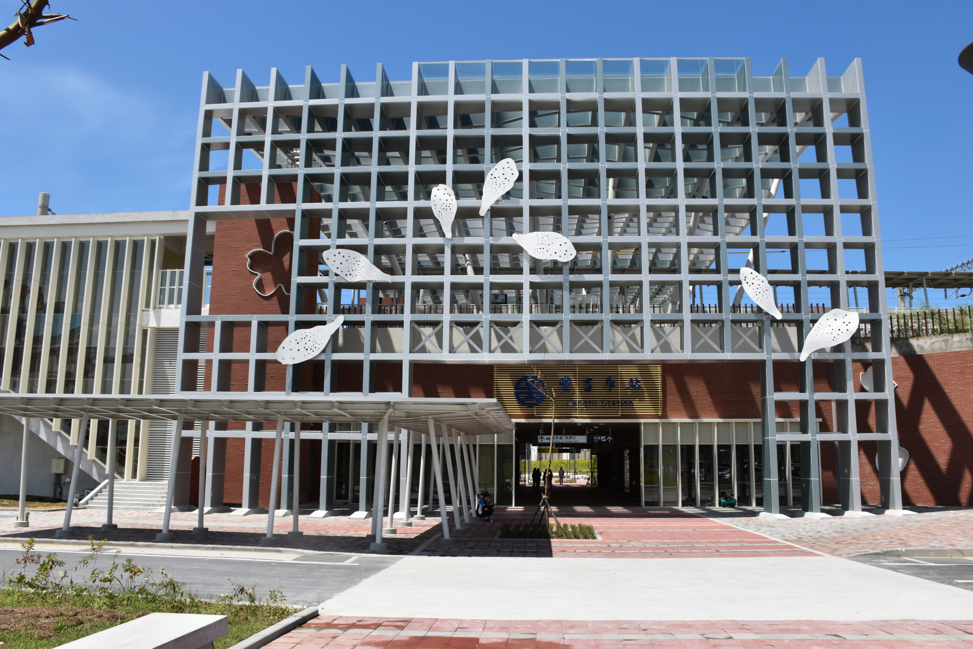 配合高鐵苗栗站新建的豐富車站新站體